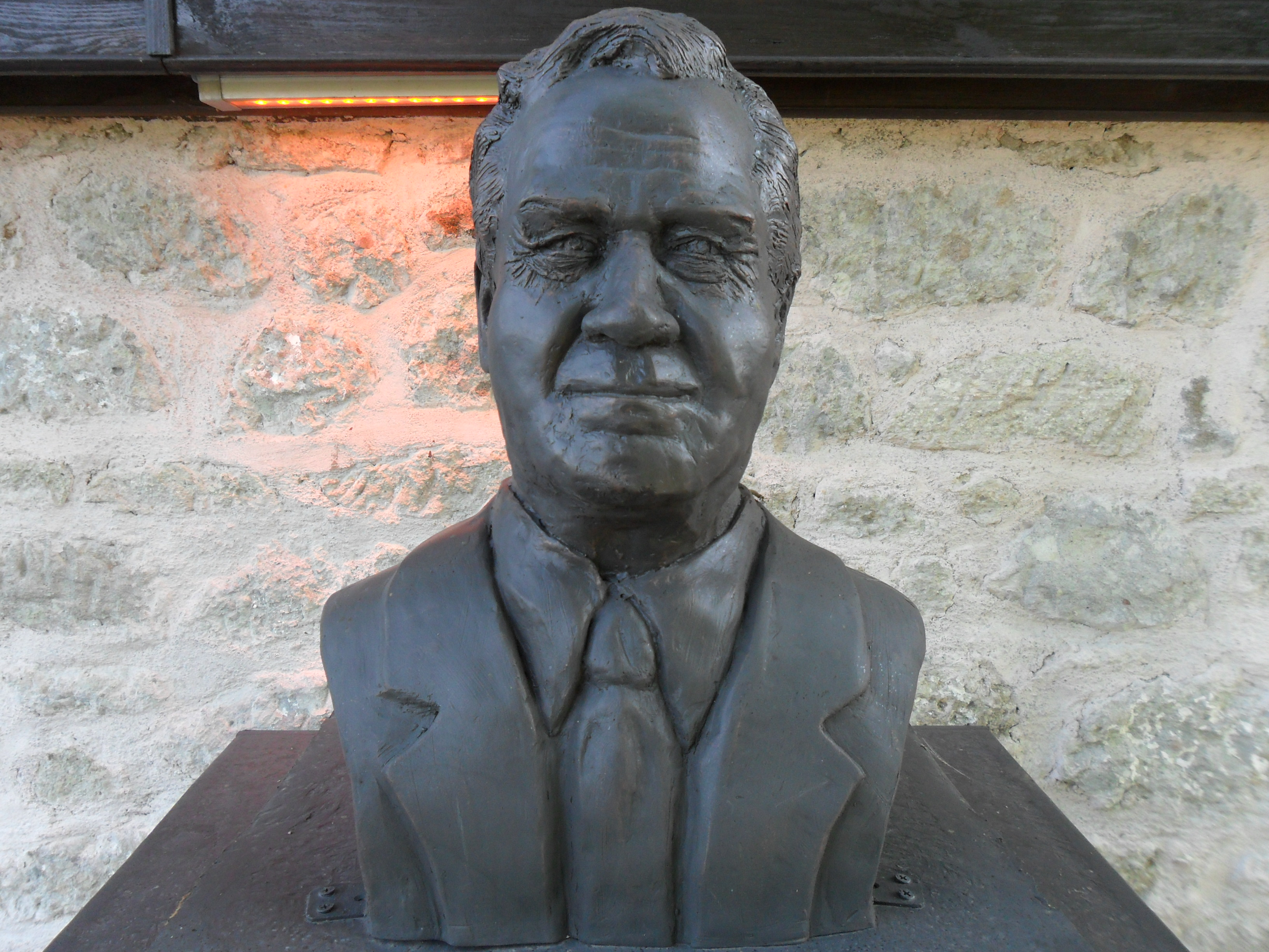 Tekkeköy Mağaraları Arkeoloji Vadisi Müze Evi önünde yer alan Tahsin Özgüç büstü.